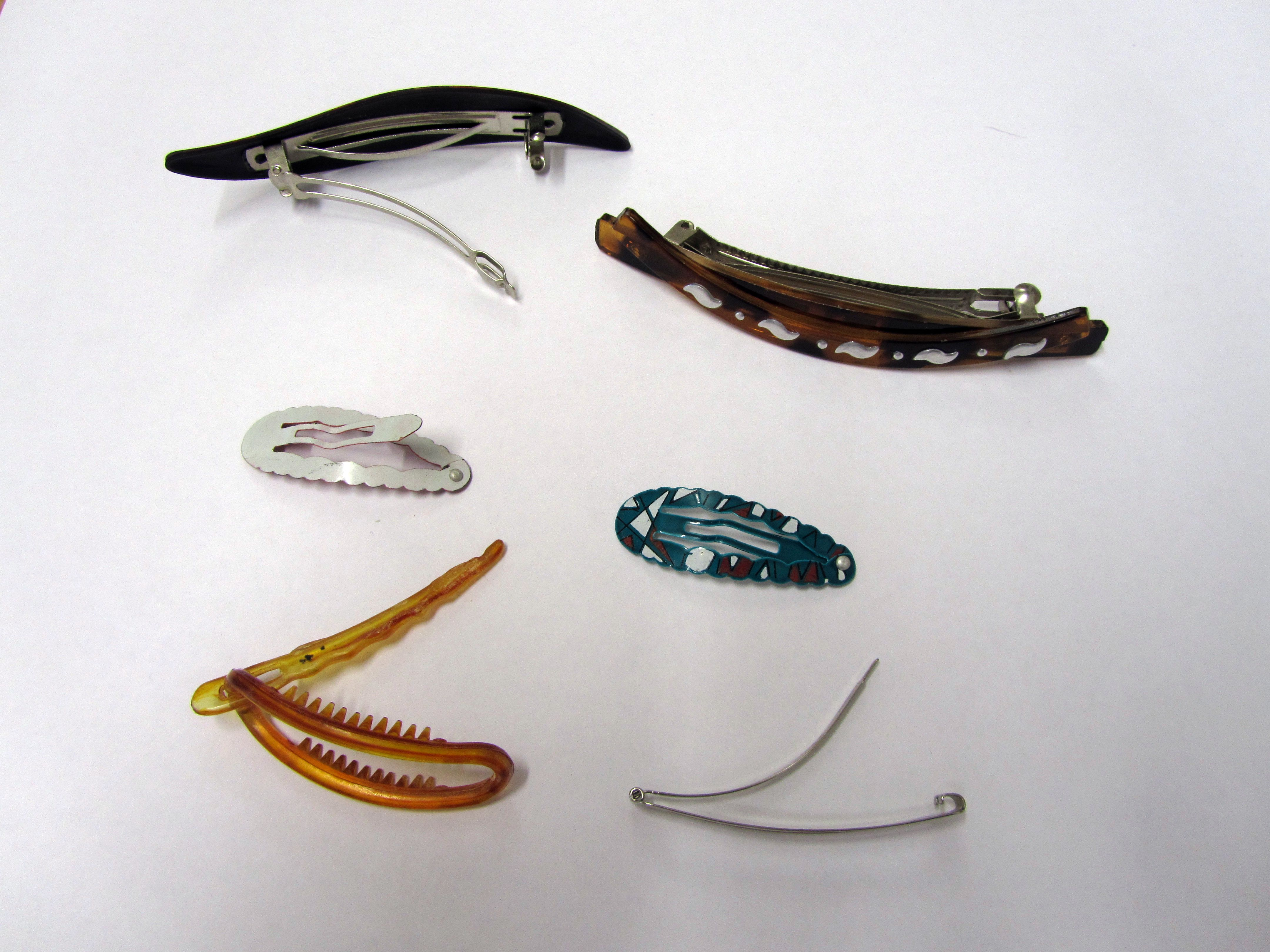 Verschiedene Modelle von Haarspangen.